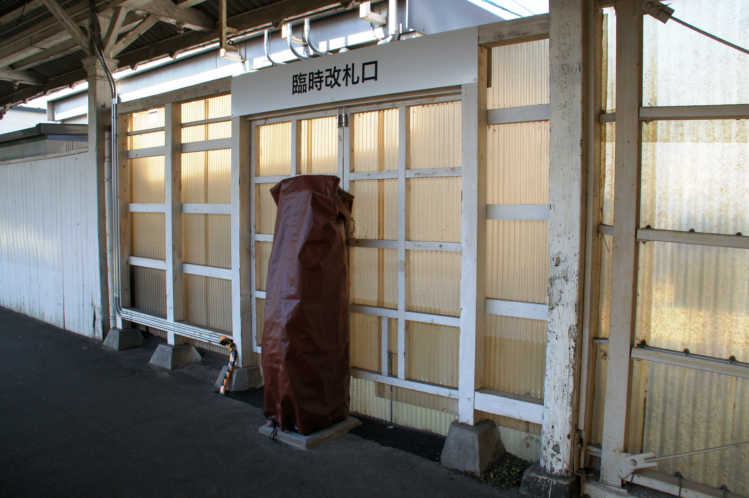 サガン鳥栖の試合の際に使用される臨時改札口